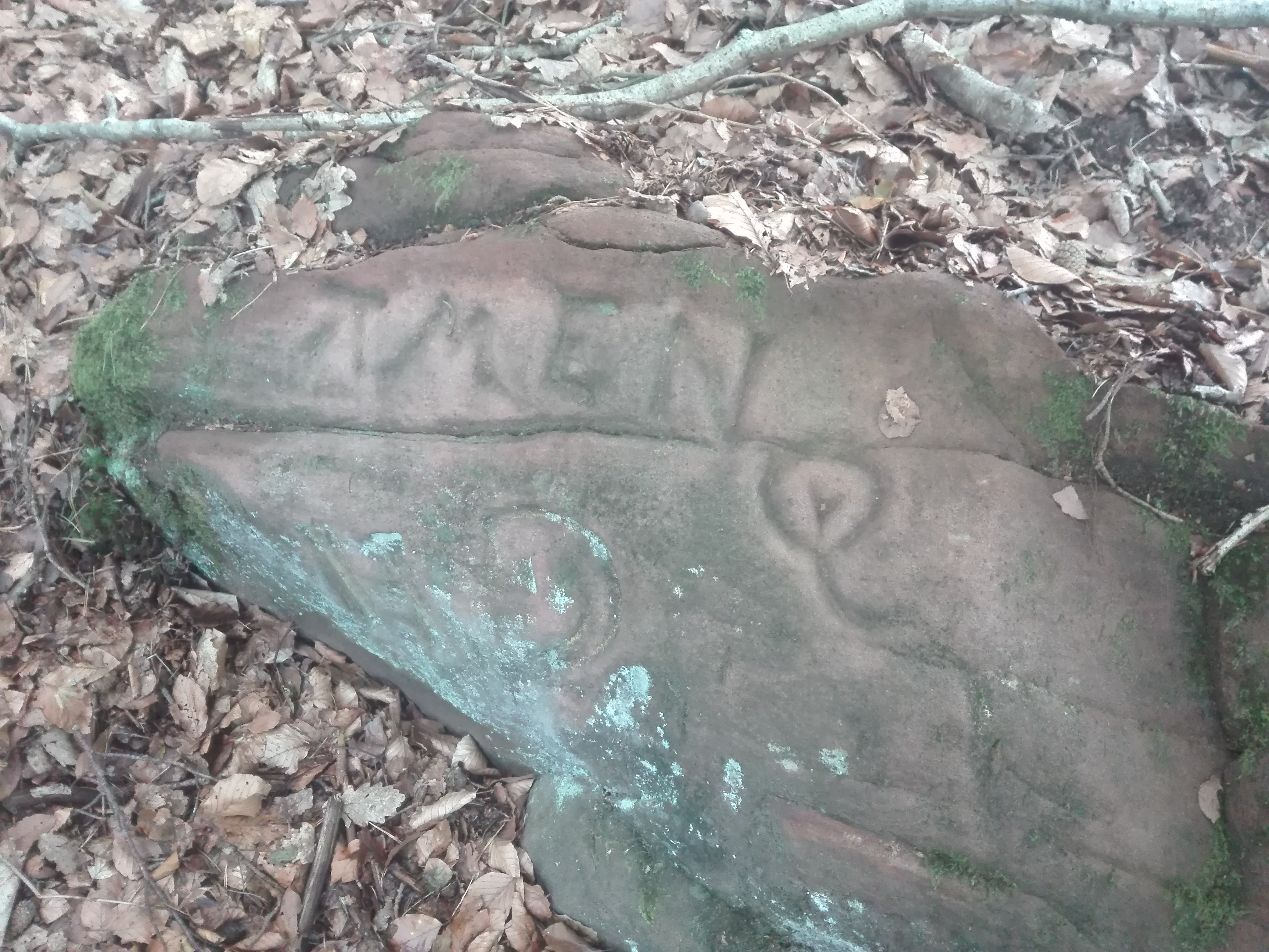 Loogfels Nr. 101 am oberen Ende des Dörrentals auf dem Teufelsfelsen bei Lambrecht. Bezeichnete ehedem die Grenze zwischen Deidesheim, Grävenhausen und Gimmeldingen.